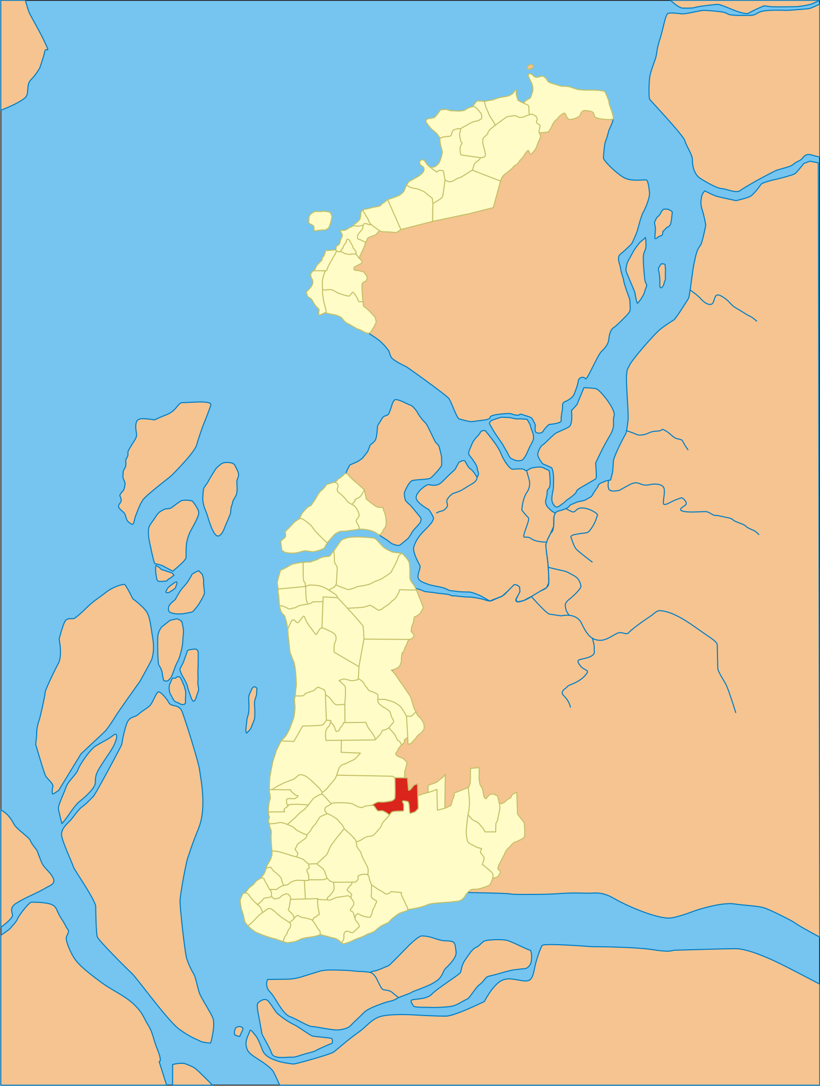 Localização do bairro em Belém do Pará.